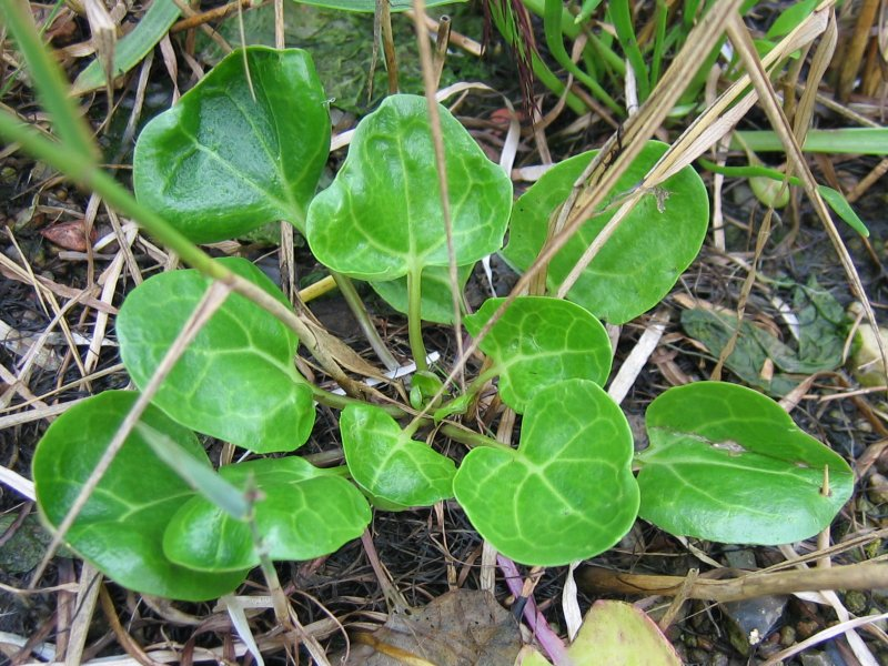 Echtes Löffelkraut Cochlearia officinalis, Wismarbucht